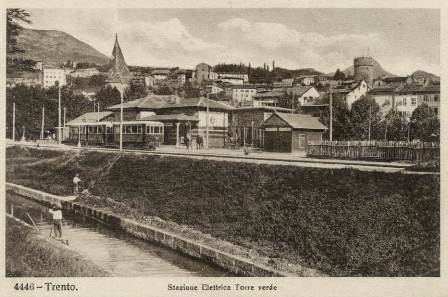 Trento, stazione tram